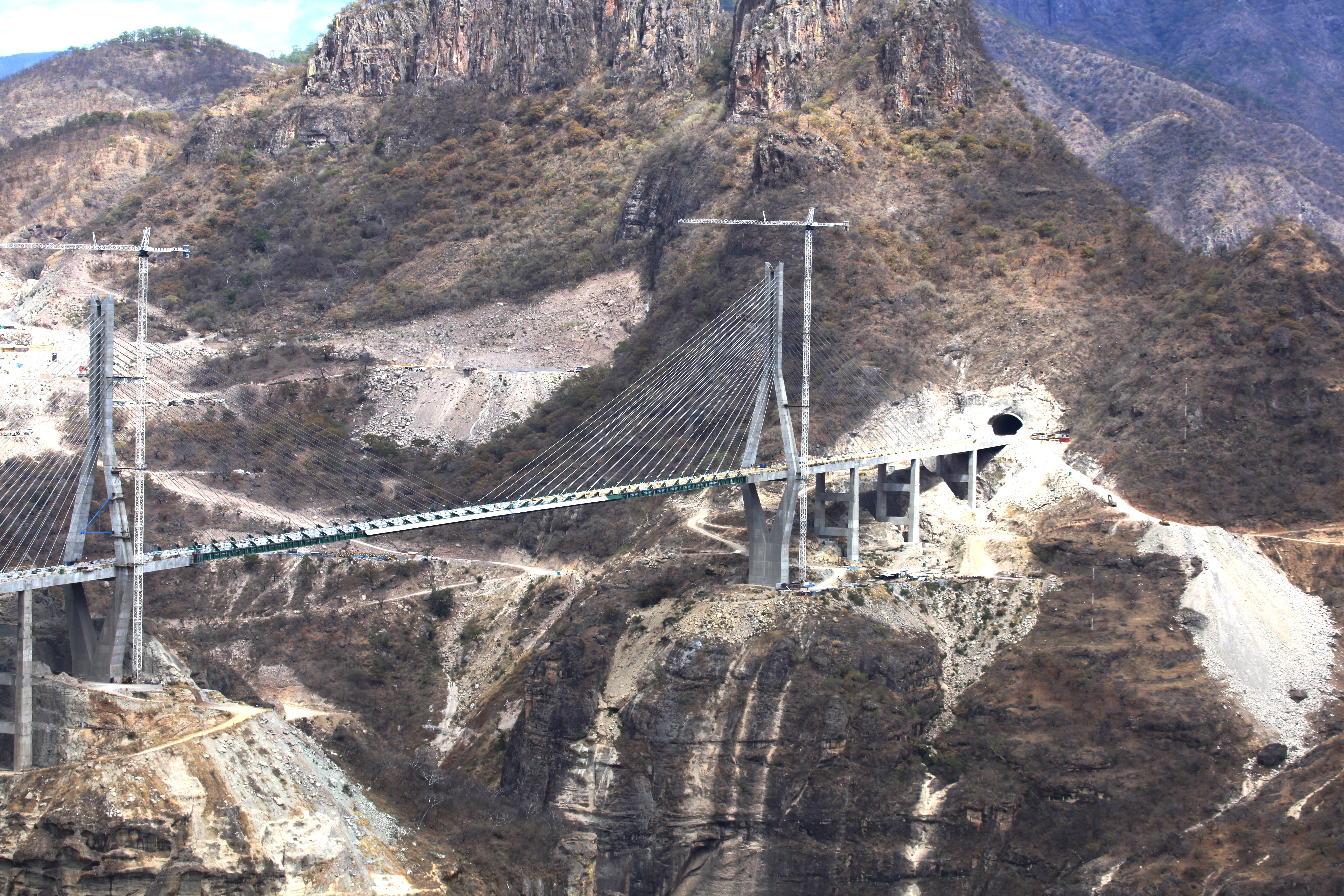 Puente Baluarte, Mexico